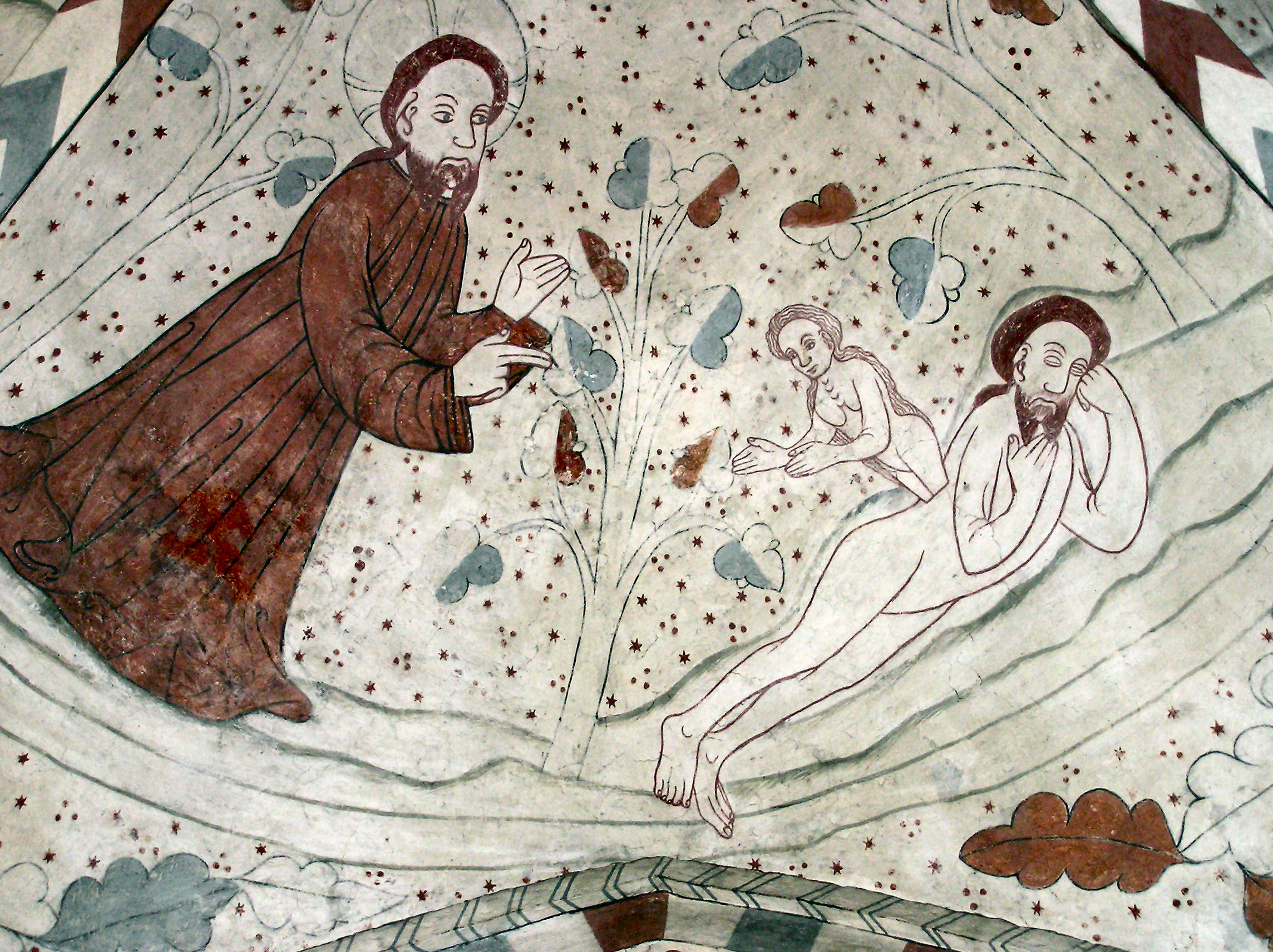 Vittskövle Kirke, Skåne, Skabelsesberetningen: Eva (1. Mos. 2,21)